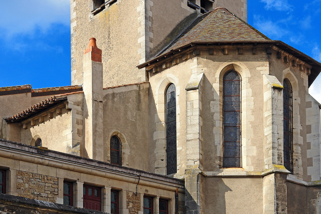 chevet et chapelle latérale sud de l'église de Nomeny. Architecture dernier tiers XII° siècle.